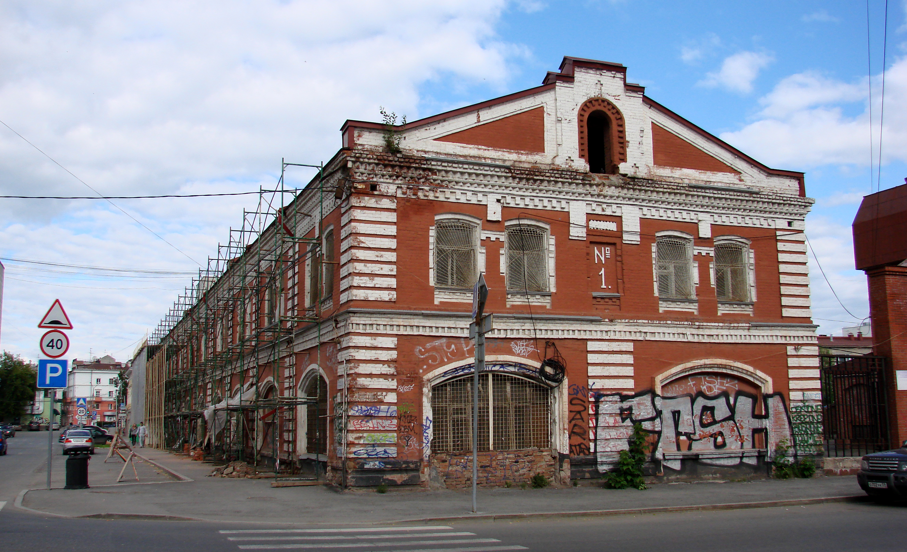 "Чёрный рынок" Пермь, улица Советская, 65-а (улица Куйбышева, 10)